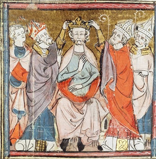 Rudolf Francouzský